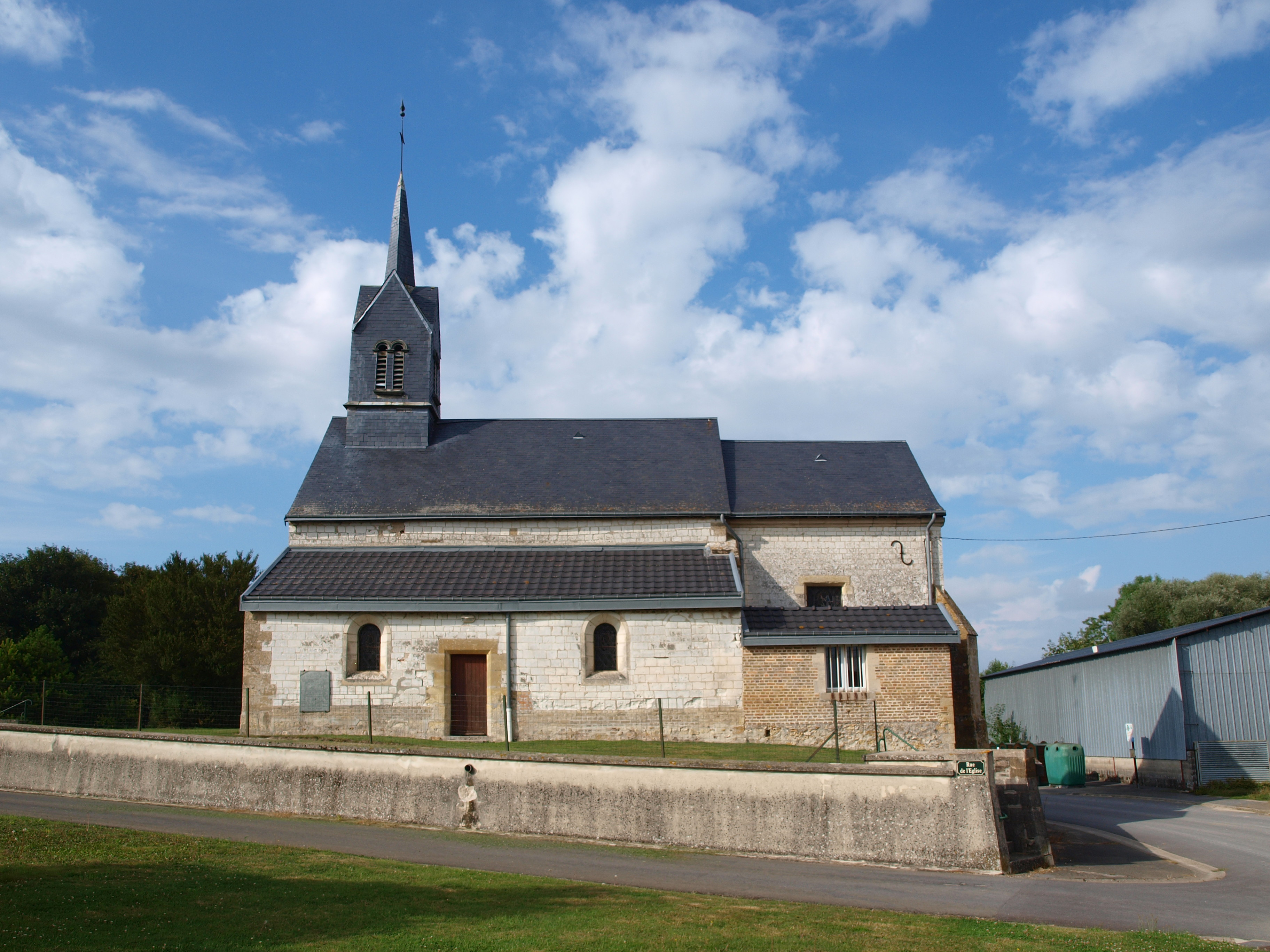 Saint-Pierre-à-Arnes (Ardennes, France) ; église